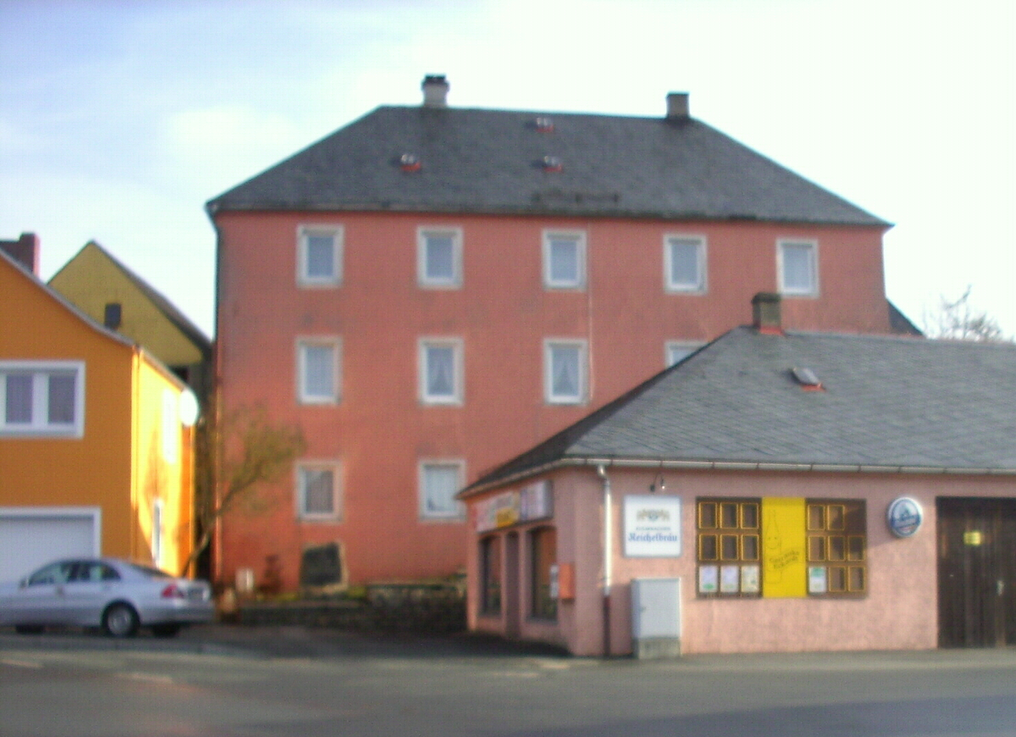 Amtshaus, erbaut auf Resten vom Sitz Sparneck - Markt Sparneck (Landkreis Hof, Oberfranken)